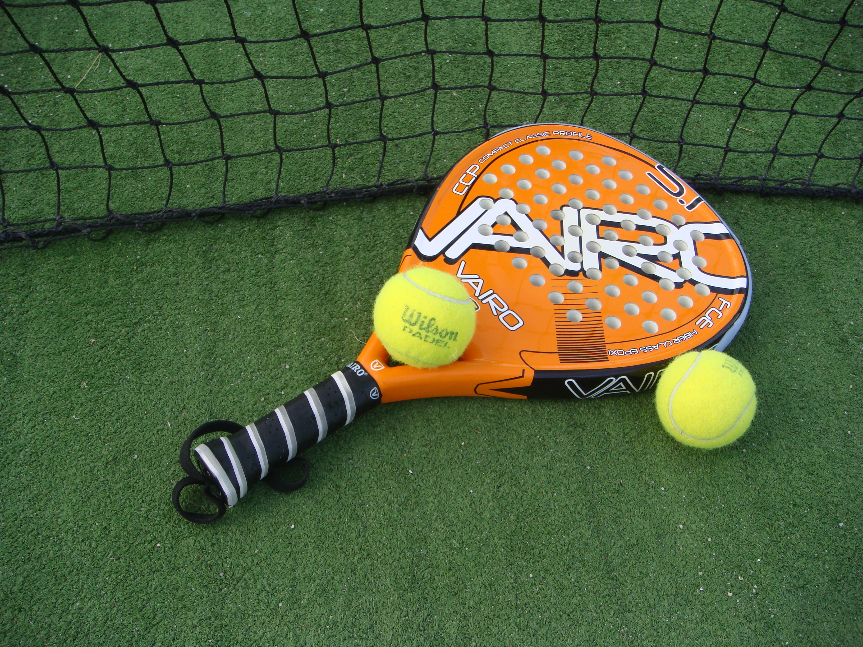 Pala de padel sobre moqueta de pista de padel